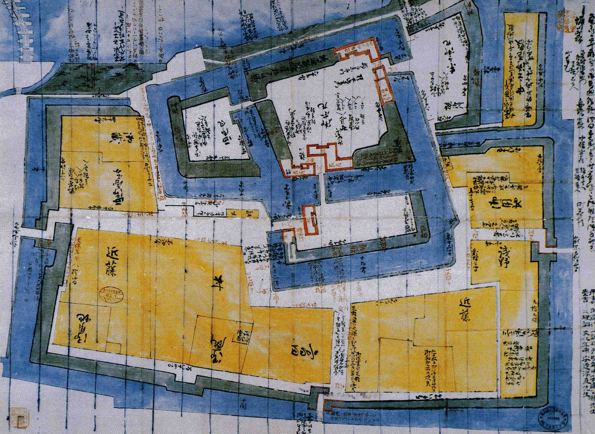 富山城図